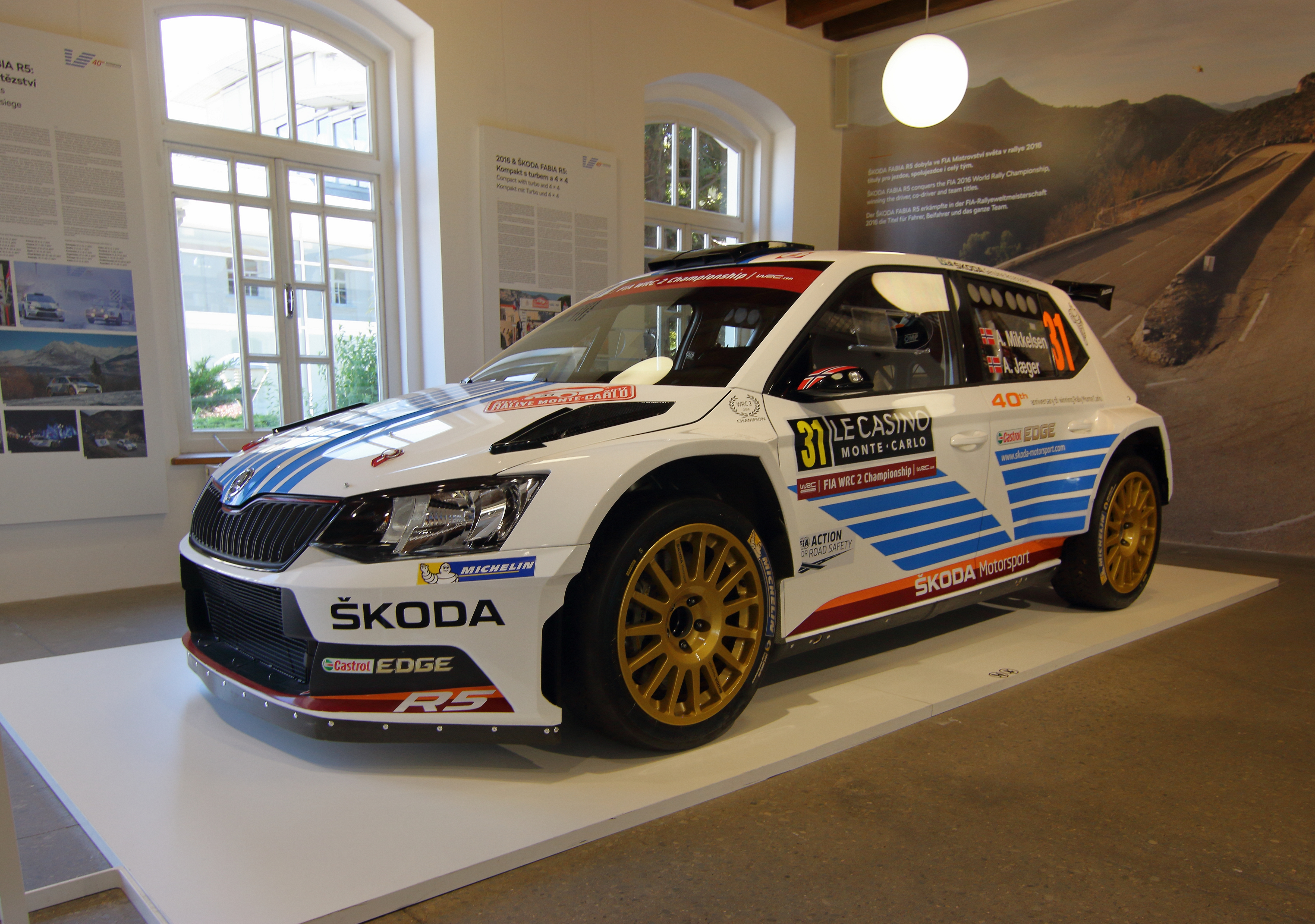 Škoda Fabia R5, Škoda Muzeum Mladá Boleslav